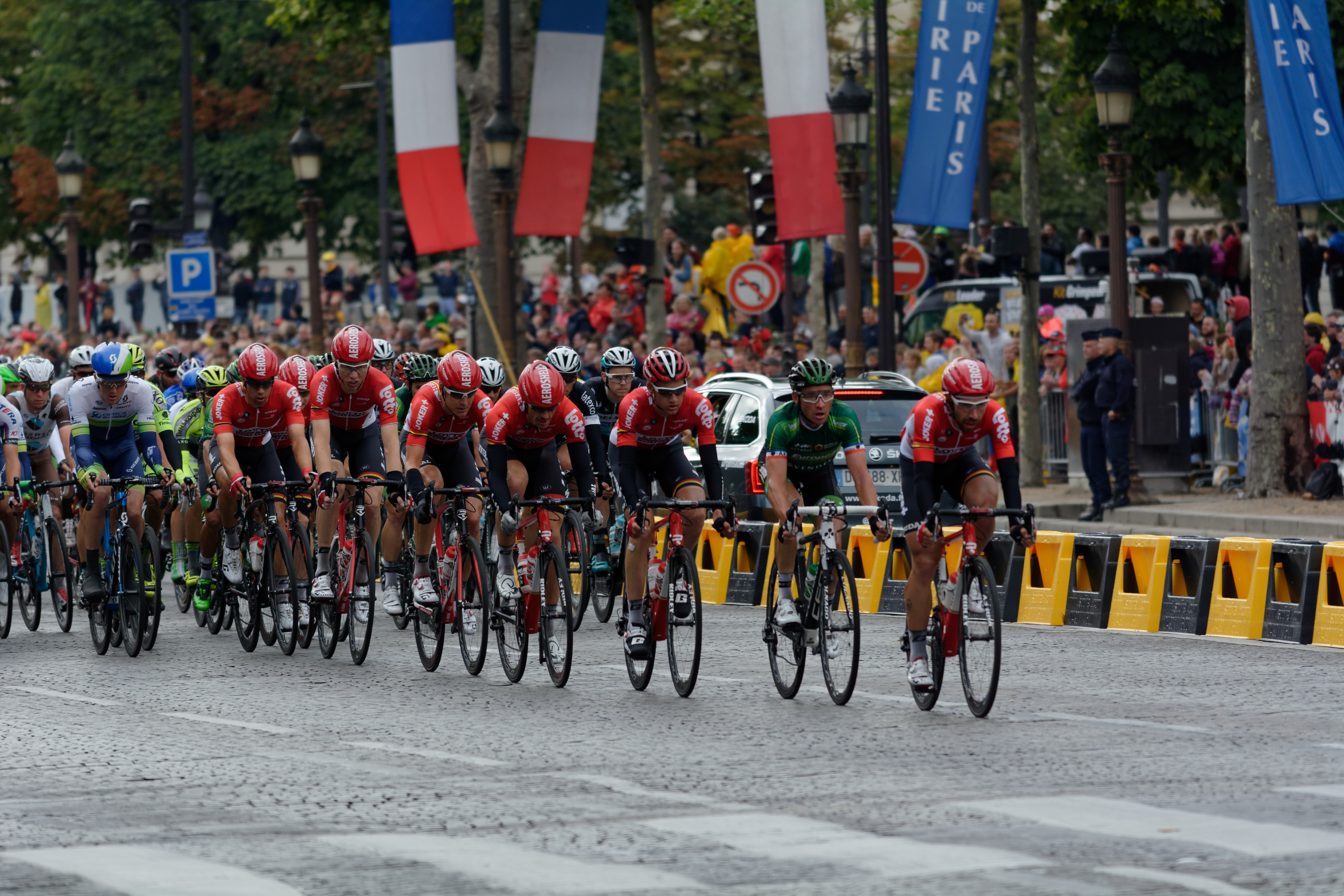 D71_2868_DxO